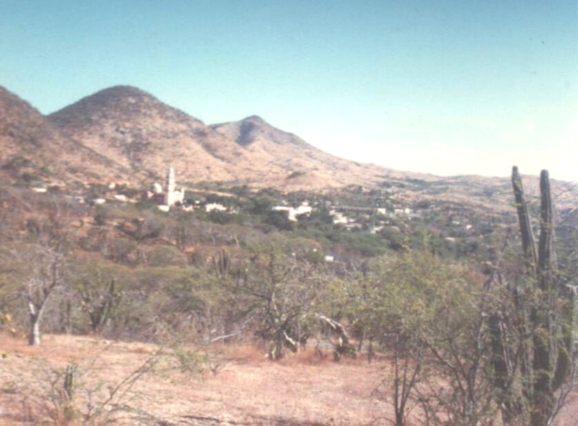 Vista panorámica de San Jerónimo Xayacatlán, en la Mixteca Baja Poblana (México)